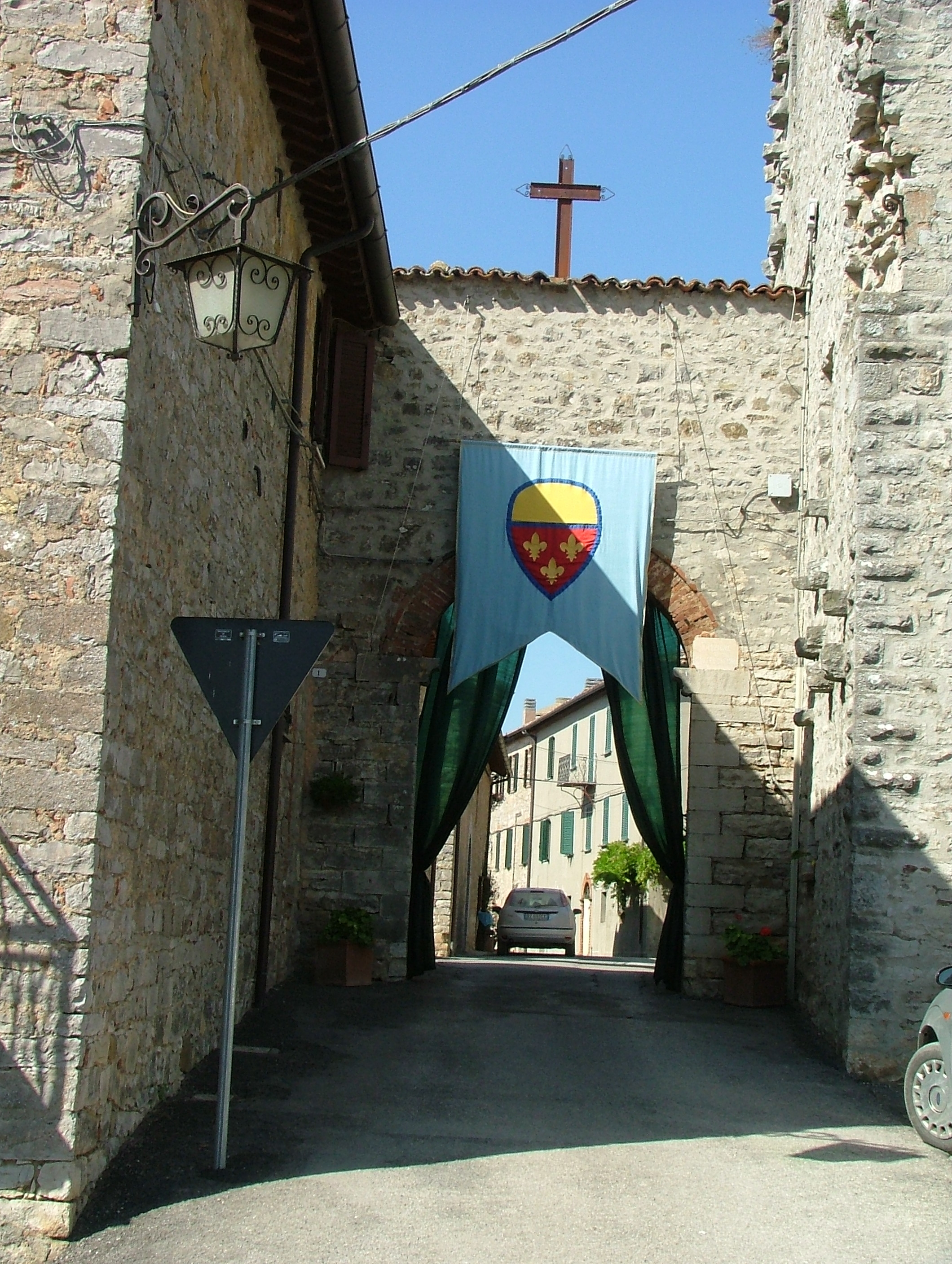 Porta di Castel di Fiori, Montegabbione (TR) con gonfalone dei Conti di Marsciano